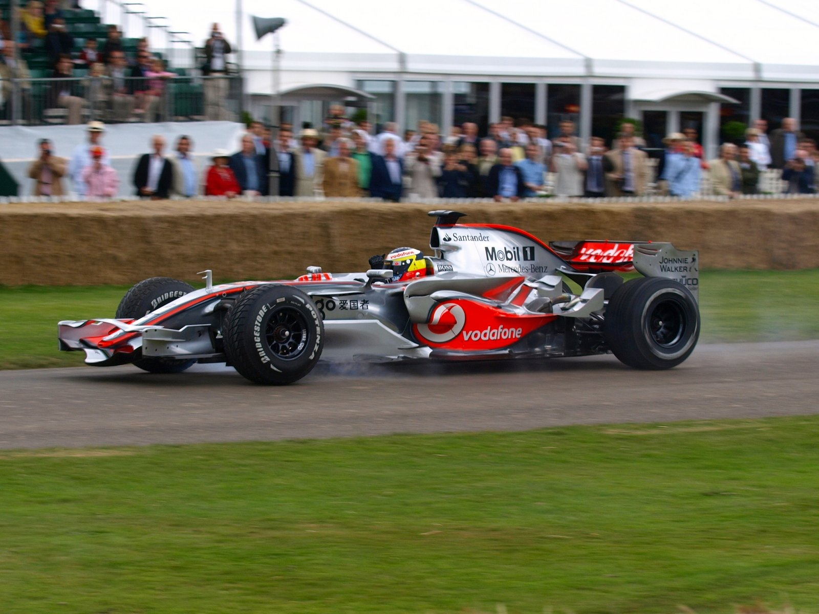 Pedro de la rosa goodwood 2008